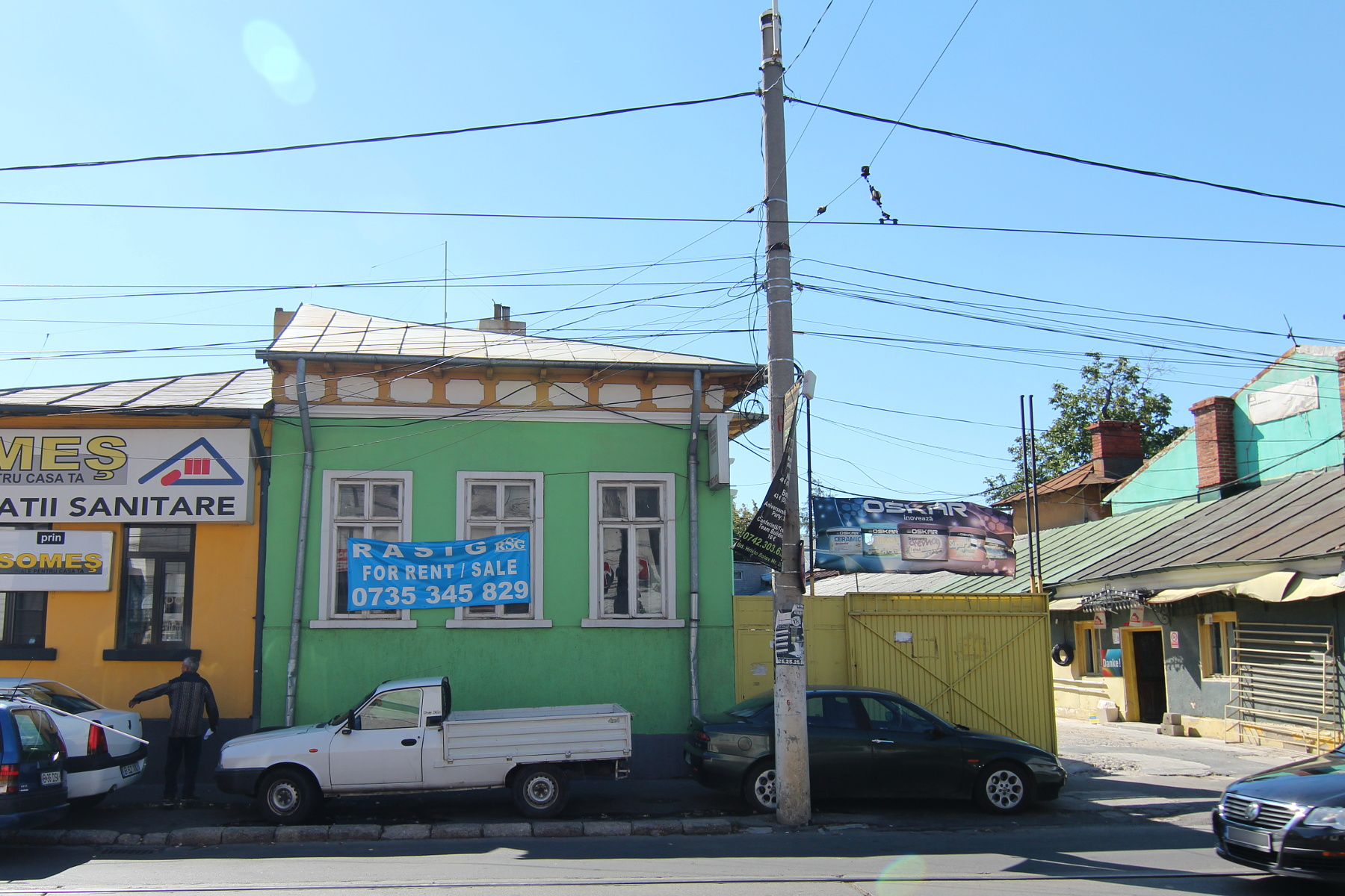 Casă pe Calea Călărașilor